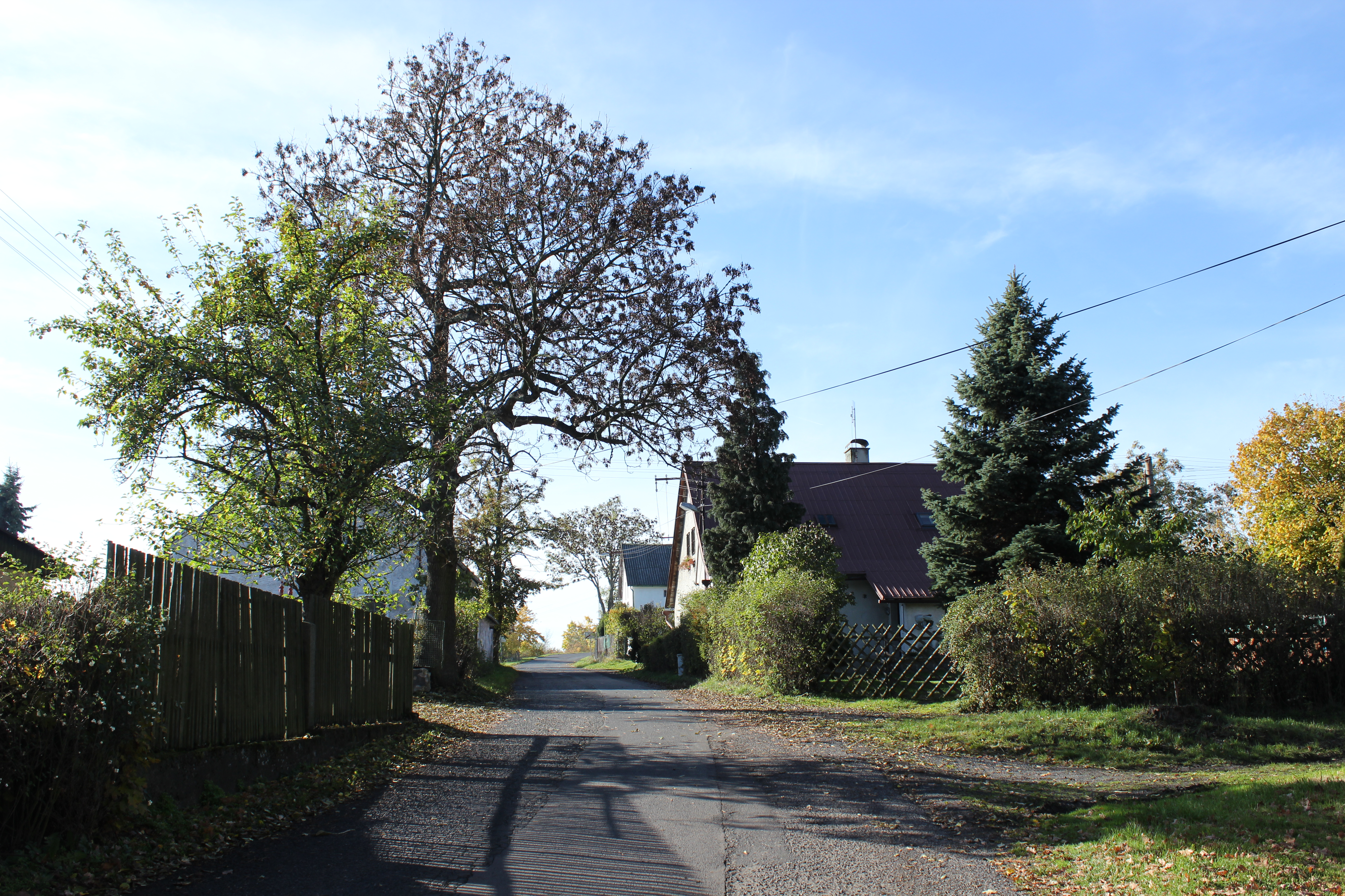 Zástavba ve Velkém Hlavákově, části Valeče.